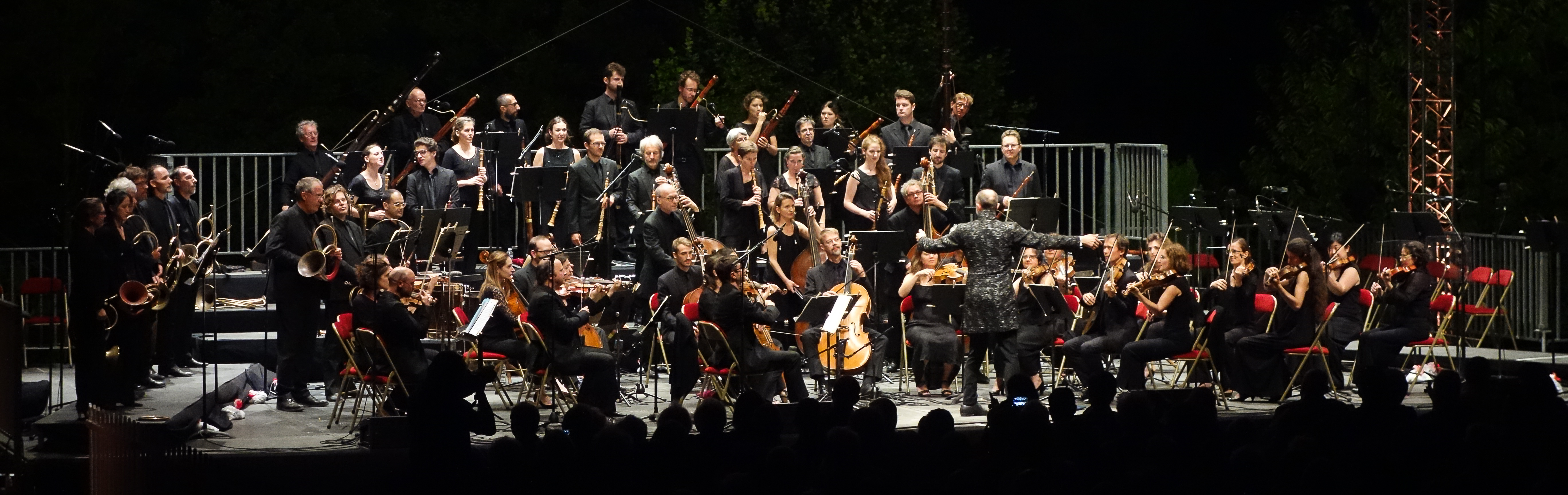 Concert du 26/08/17 au Chateau de Pupet̠ières dans le cadre du Festival Berlioz